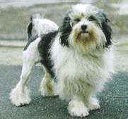 Esta es una imagen del un Perrito Leon una raza de perro.